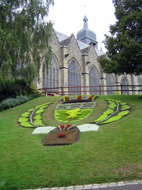 Public garden in Fougères, Ille-et-Vilaine, France